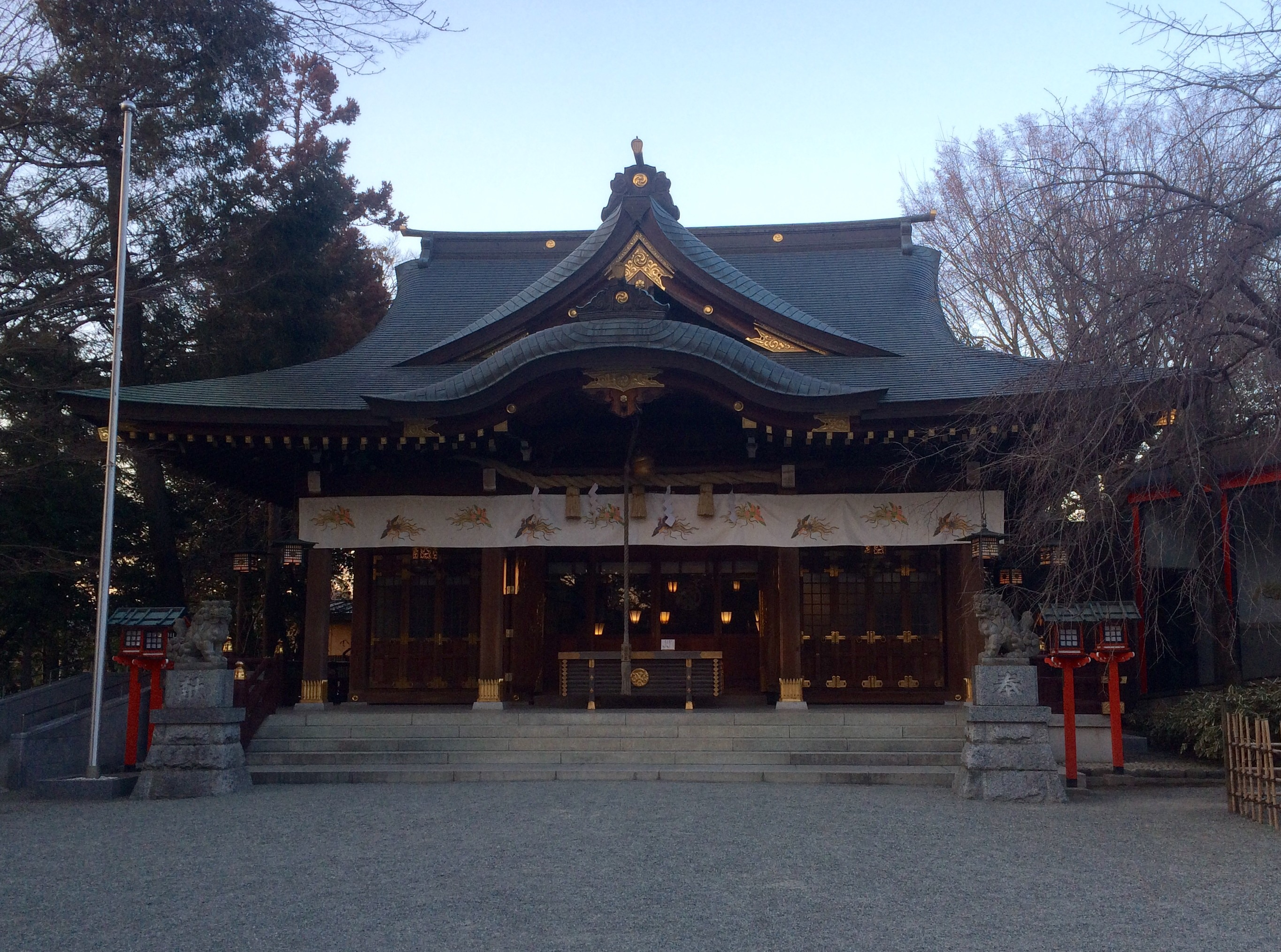 神奈川県座間市入谷に鎮座する鈴鹿明神社の拝殿。